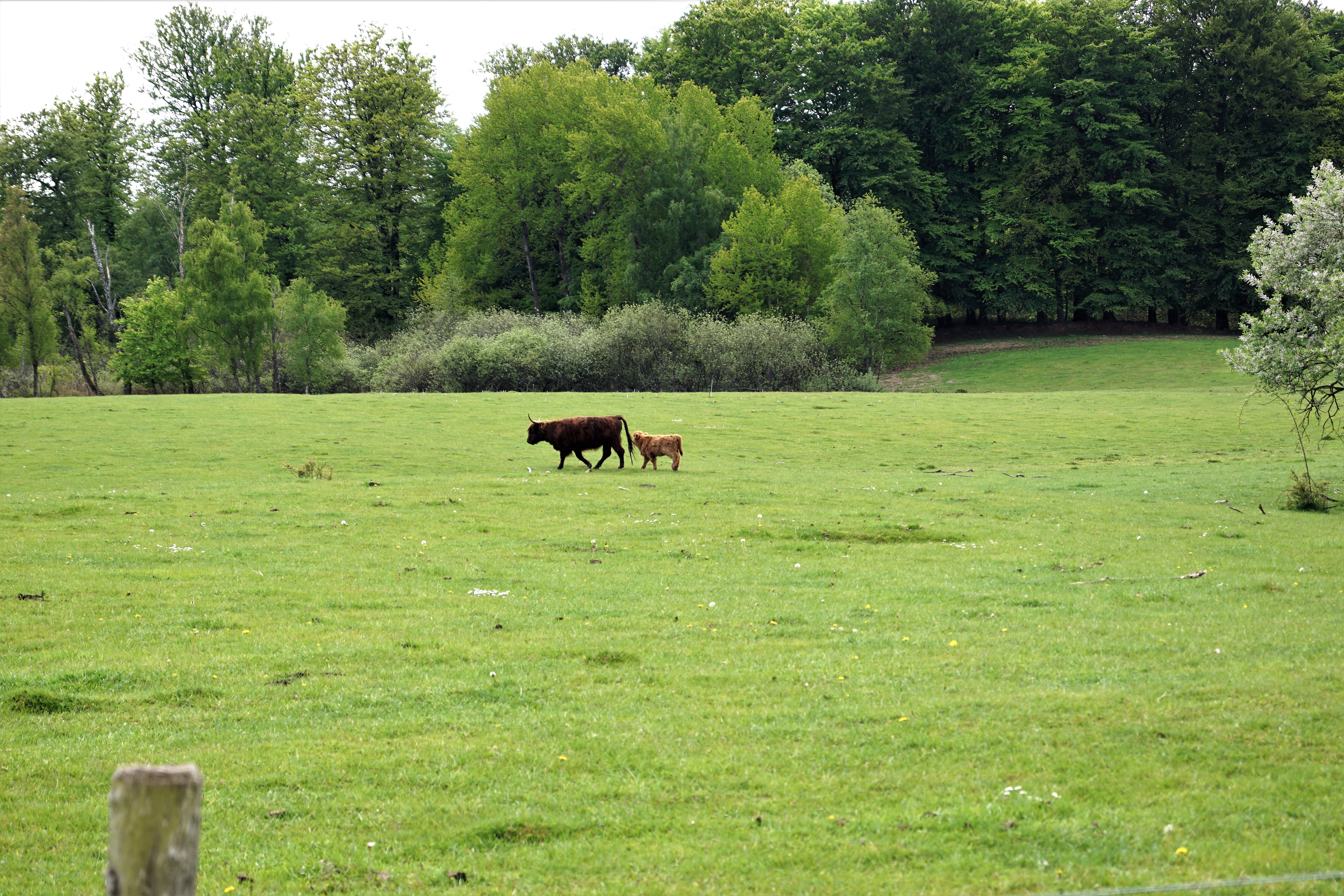 Hellebæk Kohave i Nationalpark Kongernes Nordsjælland